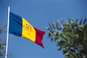 Andorra flag in nature